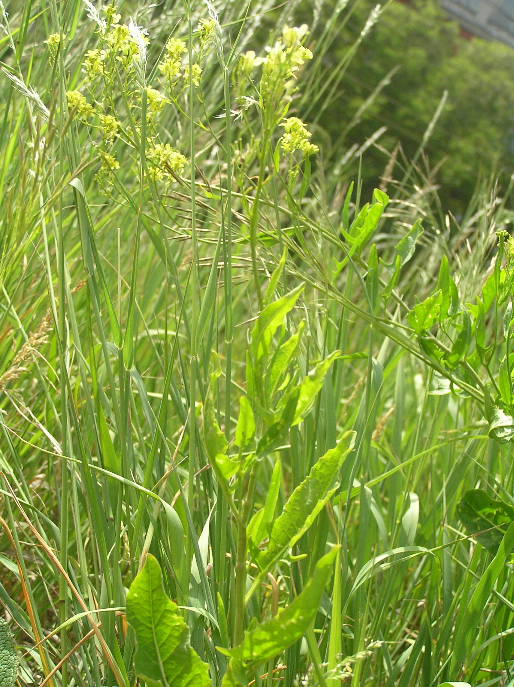 Sisymbrium volgense, Brno - Židenice, Czech Republic